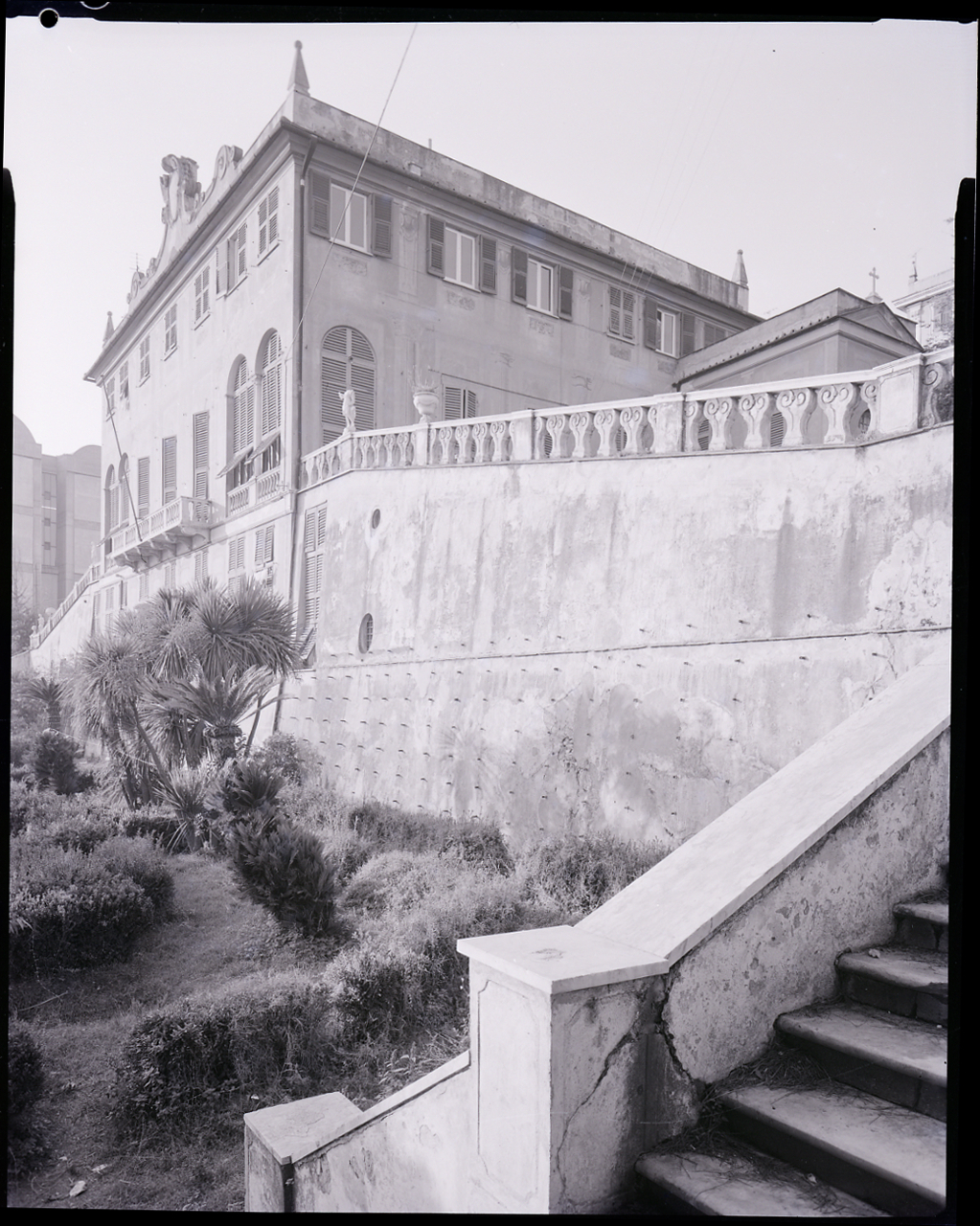 Riviera di Ponente. Genova. Sestri. Villa De Mari, Spinola detta Villa Maria. Scuola elementare e abitazioni. Facciata conterrazzo, rampe e balaustre e giardino antistante. Servizio fotografico : Genova, 1963 / Paolo Monti. - Buste: 4, Fototipi: 4 : Negativo b/n, gelatina bromuro d'argento/ pellicola ; 10x12. - ((Serie costituita da 4 buste sciolte di negativi identificati con i nn.: 7499, 7500, 7501, 7502. - Il negativo identificato con il numero 46397 è stato realizzato per Zodiac. - Occasione: Documentazione per la pubblicazione: Italia Nostra (a cura di), "Le ville genovesi", catalogo della mostra, Genova 1962, Genova, Comune di Genova, 1967. - : Le ville genovesi, catalogo della mostra, Genova 1962, Genova, Comune di Genova (1967). - Fonte: Lettera di Paolo Monti: I. Carteggi/ Genova - Enrico (1963-1966), presso Archivio Paolo Monti. Camicia con documenti dattiloscritti e manoscritti vari relativi al lavoro eseguito per Italia Nostra: preventivi, lettere, inventari. - Fonte: Rubrica di Paolo Monti: Archivio fino 1-4-1961/ 31-3-1963 (1961-1963), presso Archivio Paolo Monti. - Fonte: Agenda di Paolo Monti: R 1 - Monti/ 1 aprile 1963 - 6 giugno 1964/ 6000-8193 (1963-1964), presso Archivio Paolo Monti. - Fonte: Monografia di Italia Nostra (a cura di)